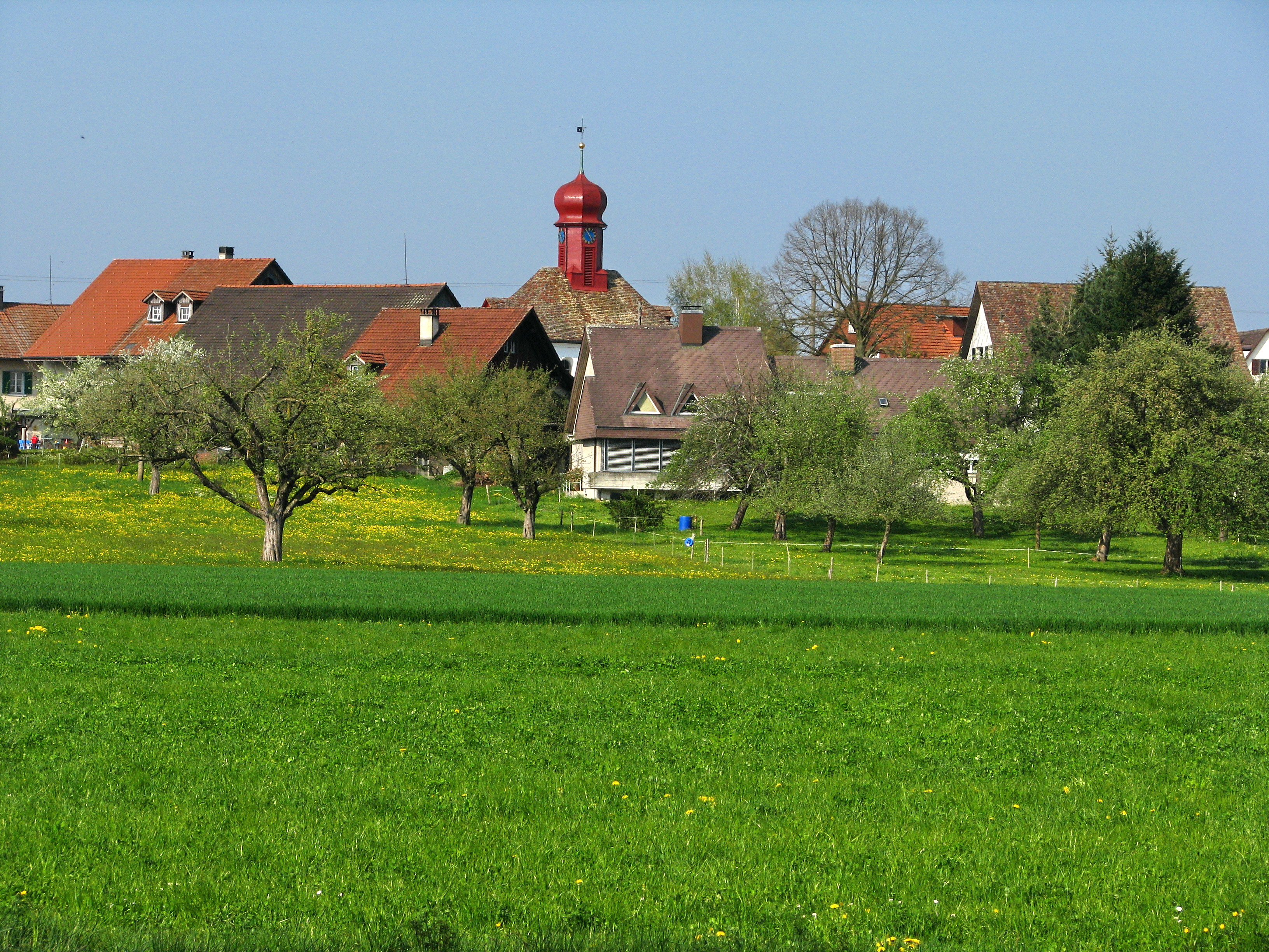 Schwerzenbach as seen from Glatt river